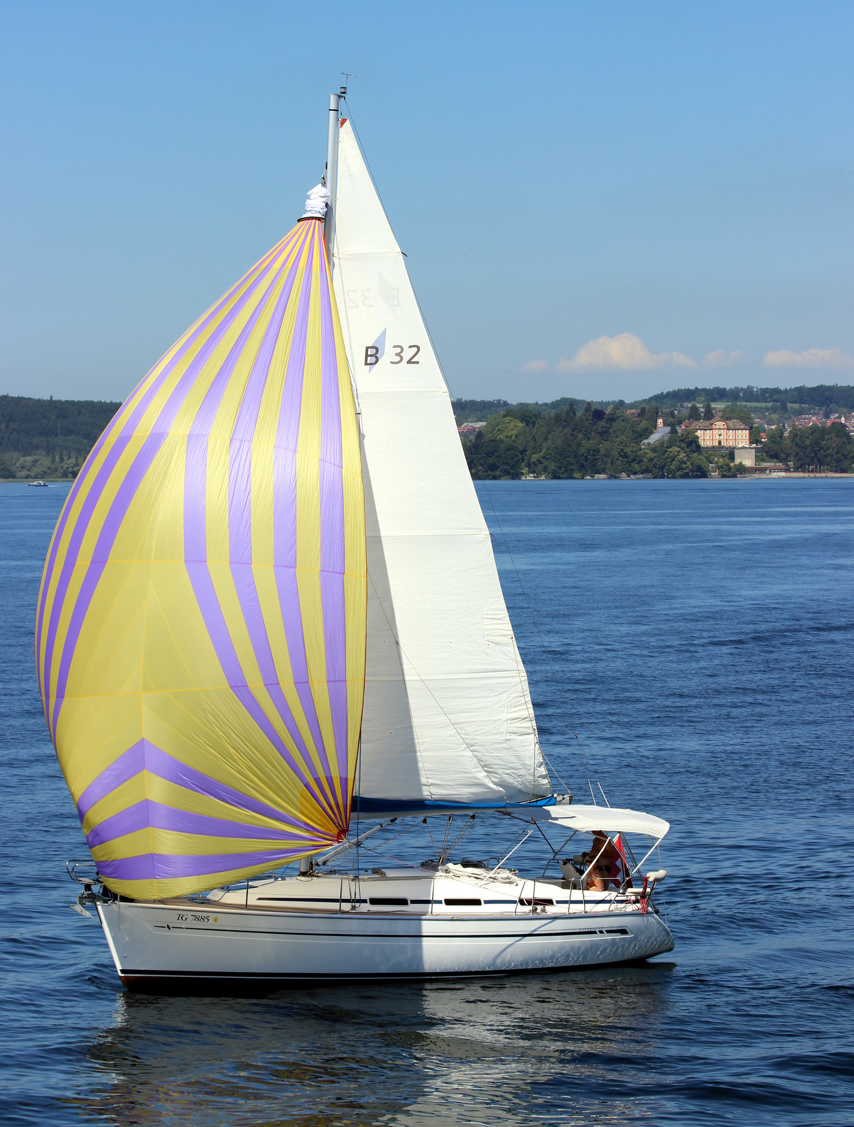 Segelboot auf dem Bodensee, im Hintergrund das Schloss Mainau